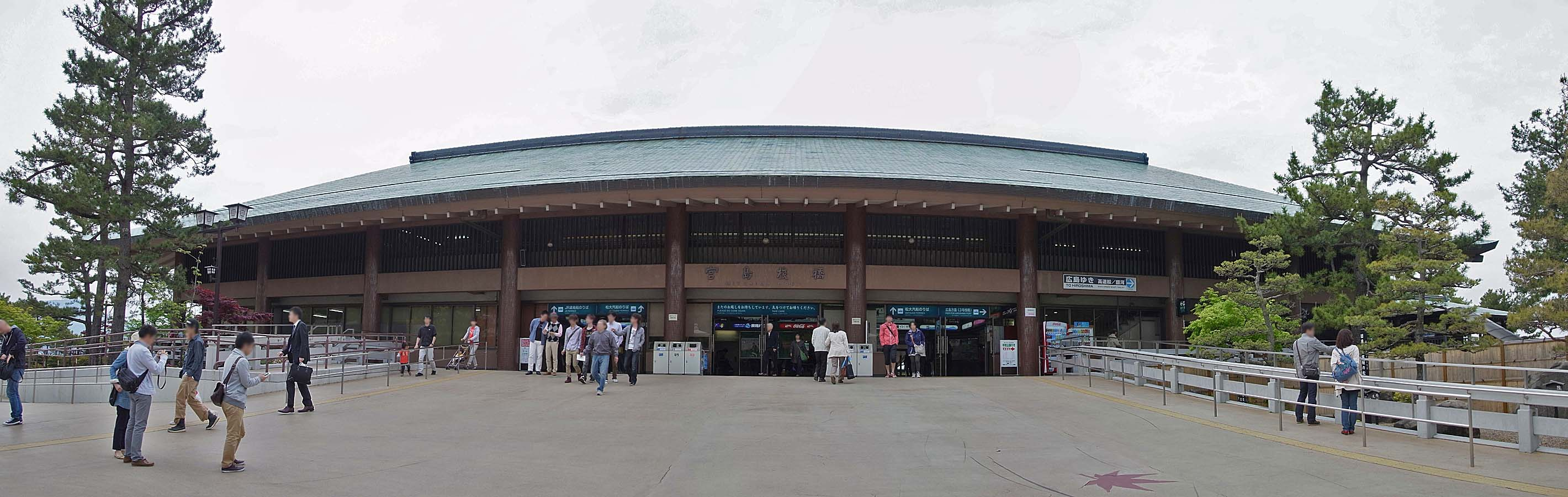 Miyajima ferry , 宮島フェリー